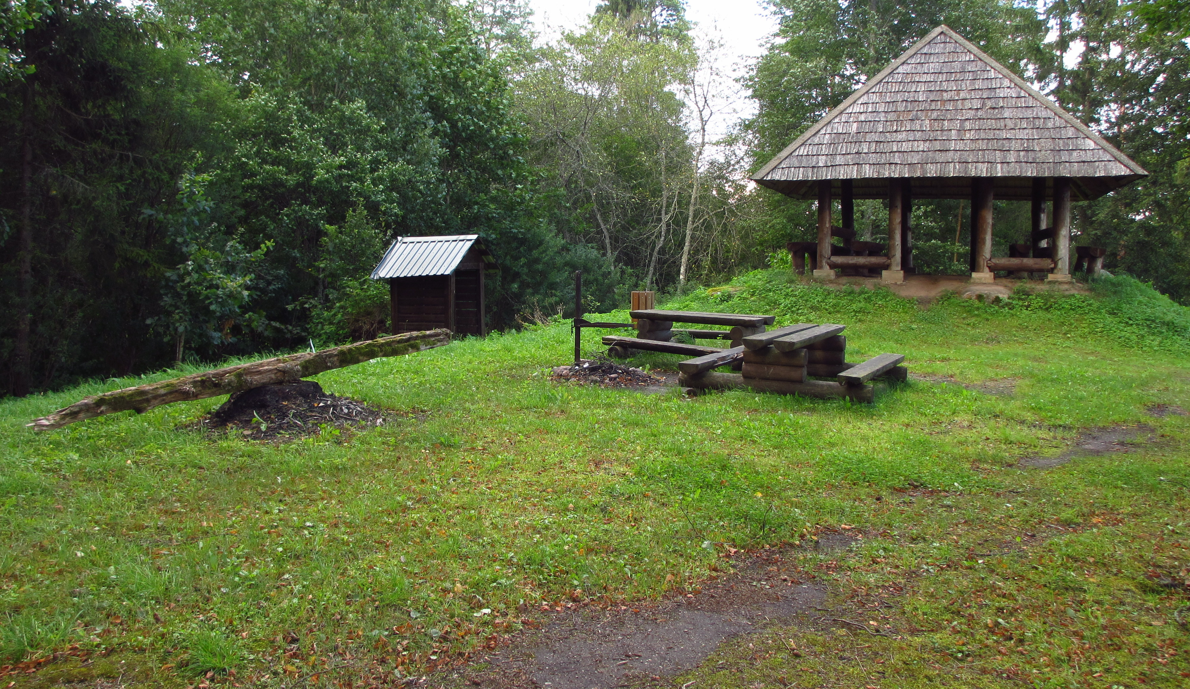 Lustimägi Elva jõe ääres